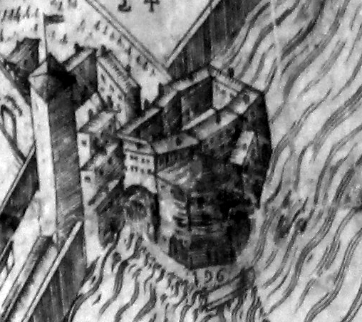 Pianta del buonsignori, dettaglio 196 zecca nuova